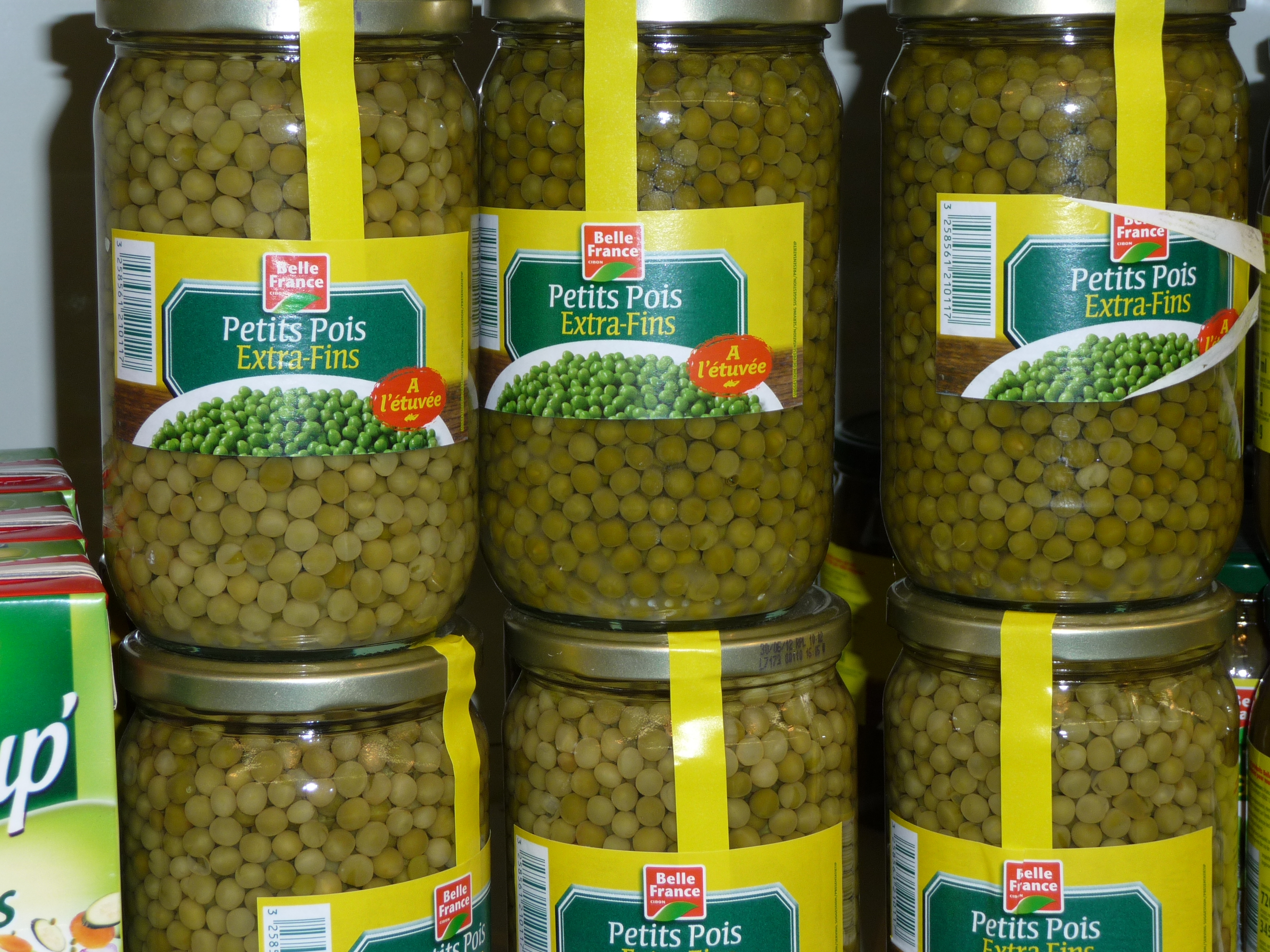 Petits pois (Pisum sativum) conservés en bocaux de verre